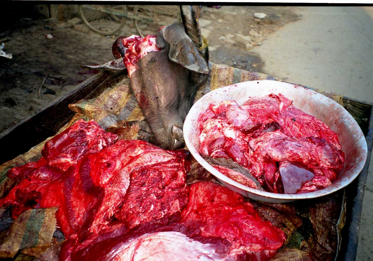 露天に並ぶ水牛肉（カトマンズ、ネパール）